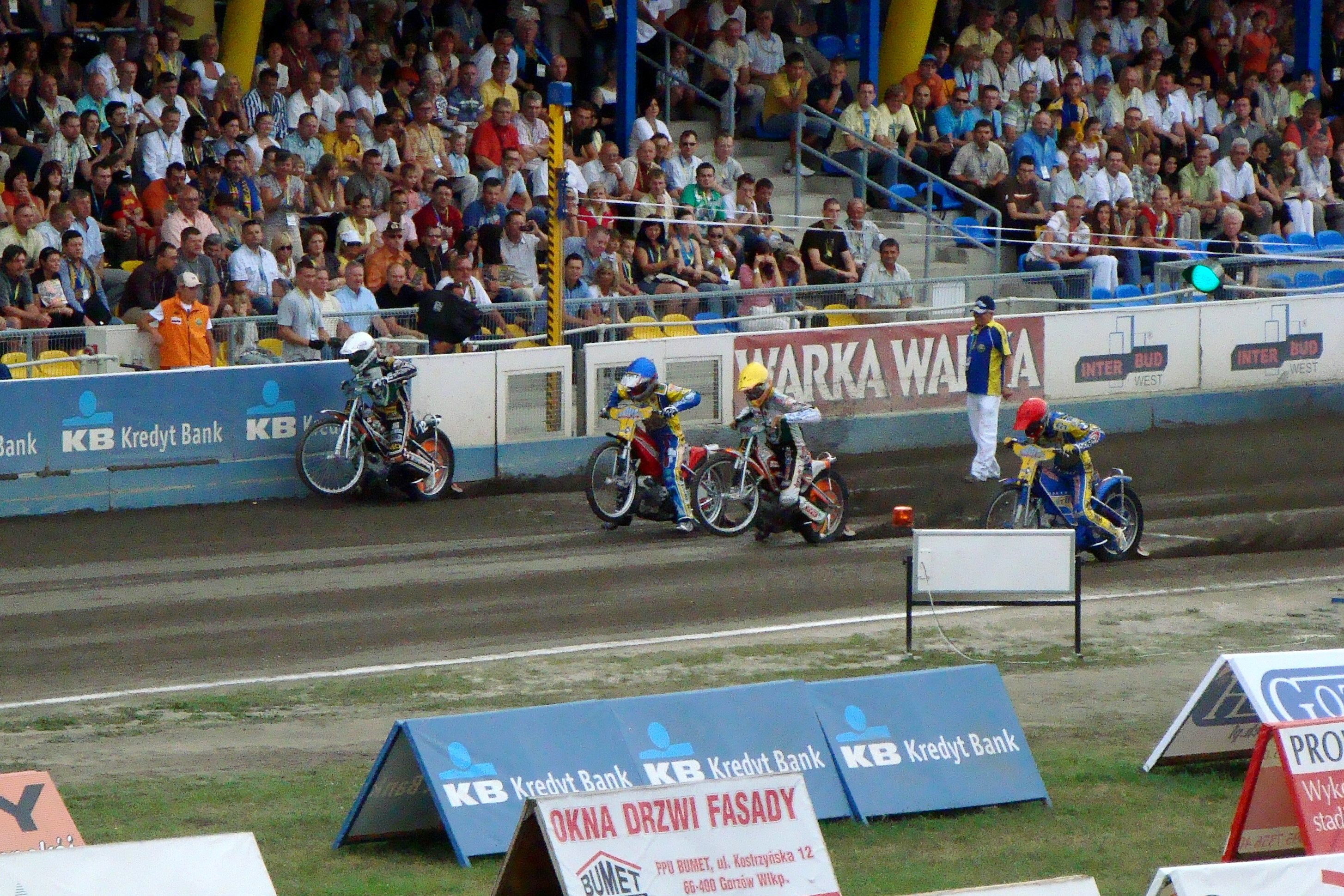 Gorzów Wlkp.- 3. 08. 2008 r. Derby Ziemi Lubuskiej nr 64. Kask czerwony - nr 9 - T. Gollob; żółty - nr 1 - P. Dobrucki; niebieski - nr 10 - J.B. Monberg; biały - nr 2 - N.K. Iversen.